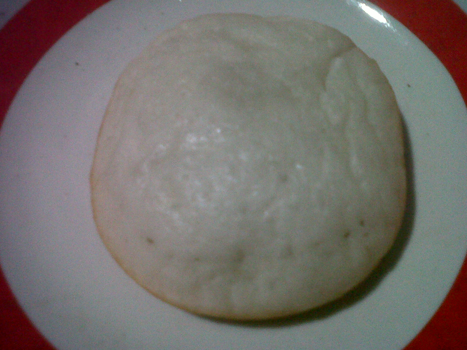 Apem terbuat dari tepung terigu menjadi salah satu jajanan tradisionala masyarakat jawa khususnya Jawa Tengah